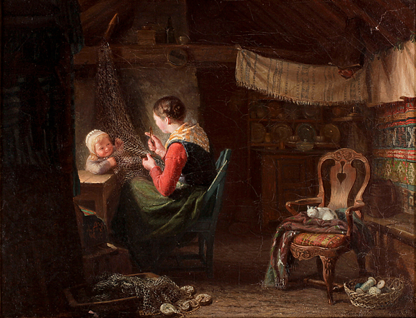 Netting